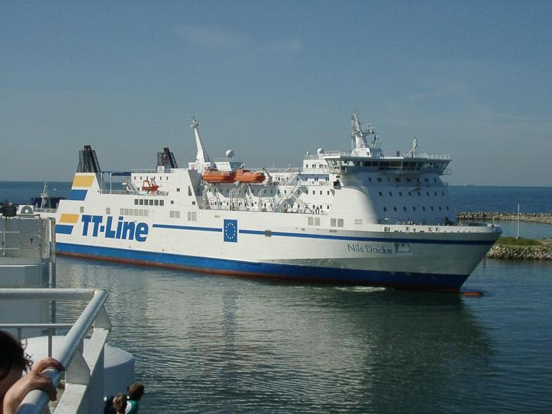 TT-Line vessel Nils Dacke